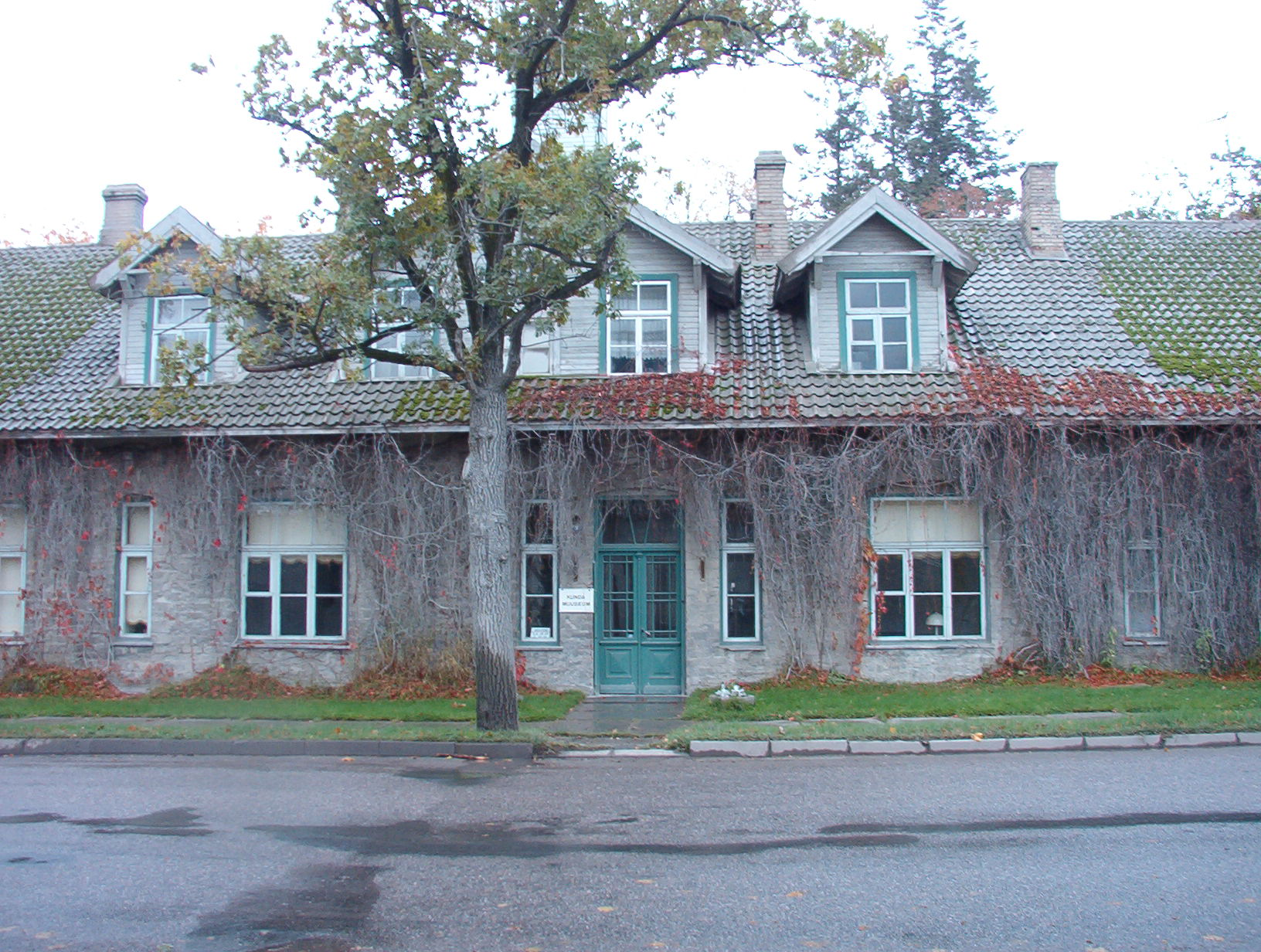 Kunda tsemendivabriku kontori hoone